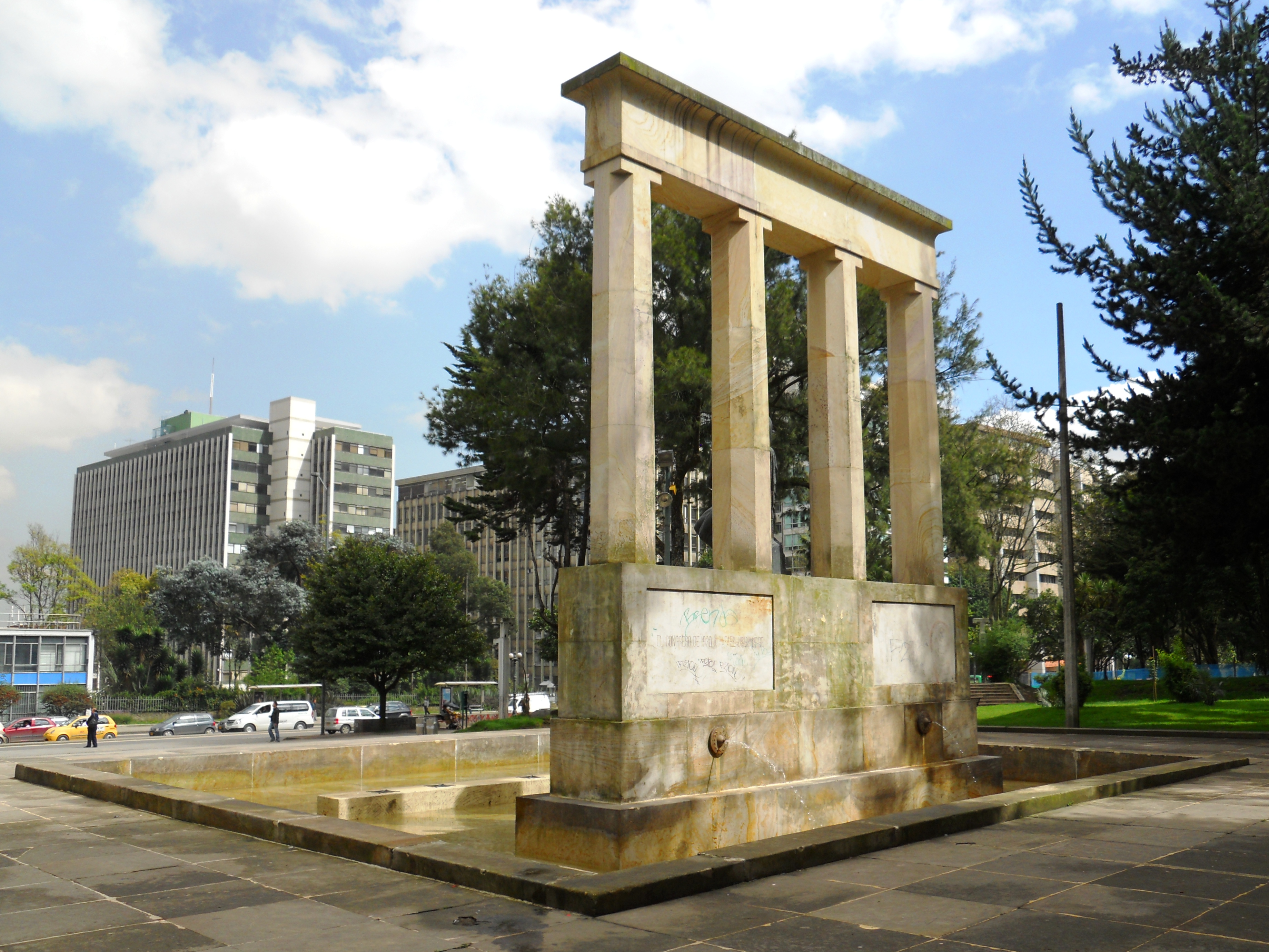 Parque Nacional, monumento a Rafael Uribe Uribe.